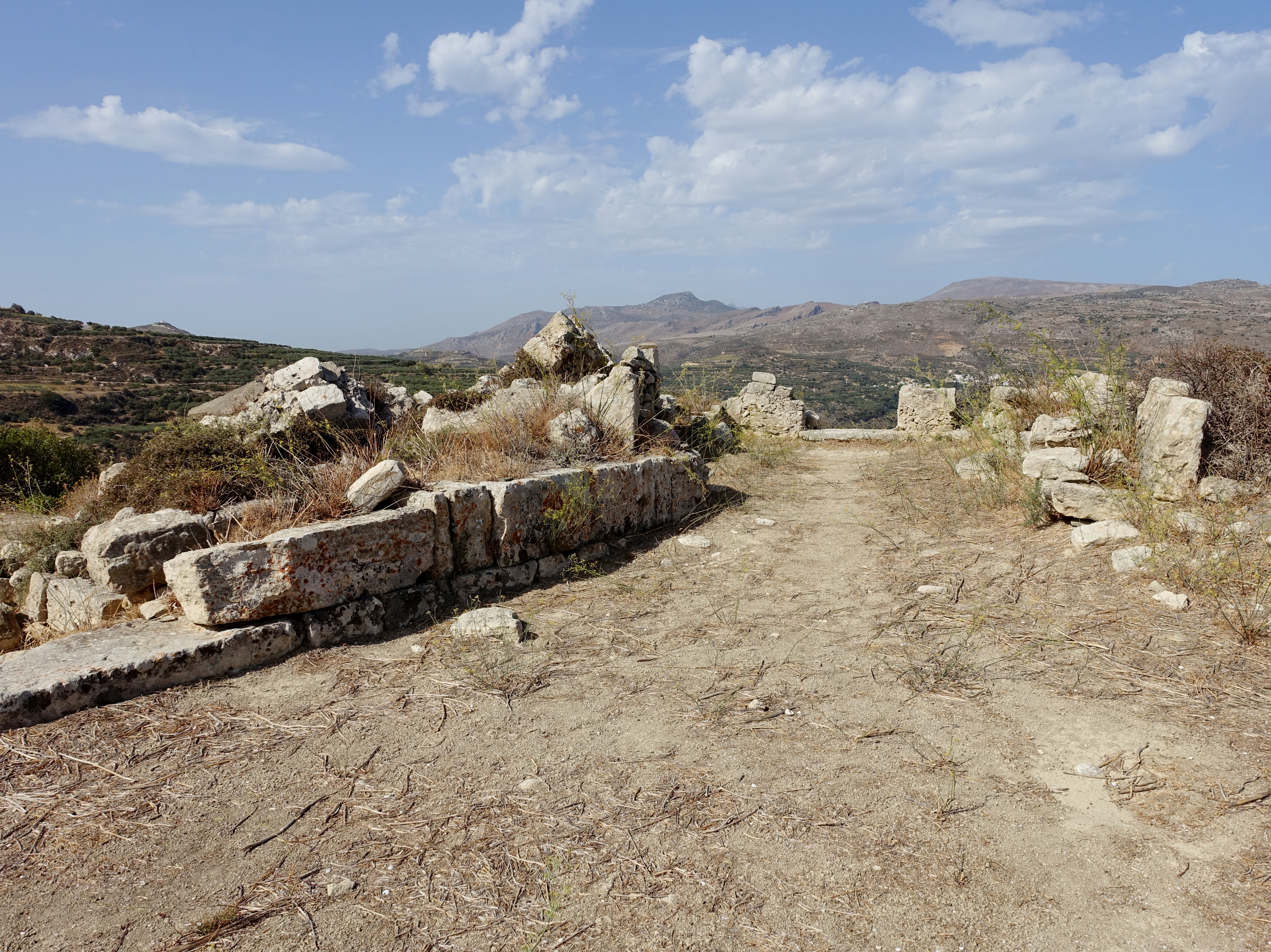 Erste Akropolis der Ausgrabungsstätte von Praisos (Πραισός), Gemeinde Sitia, Kreta, Griechenland